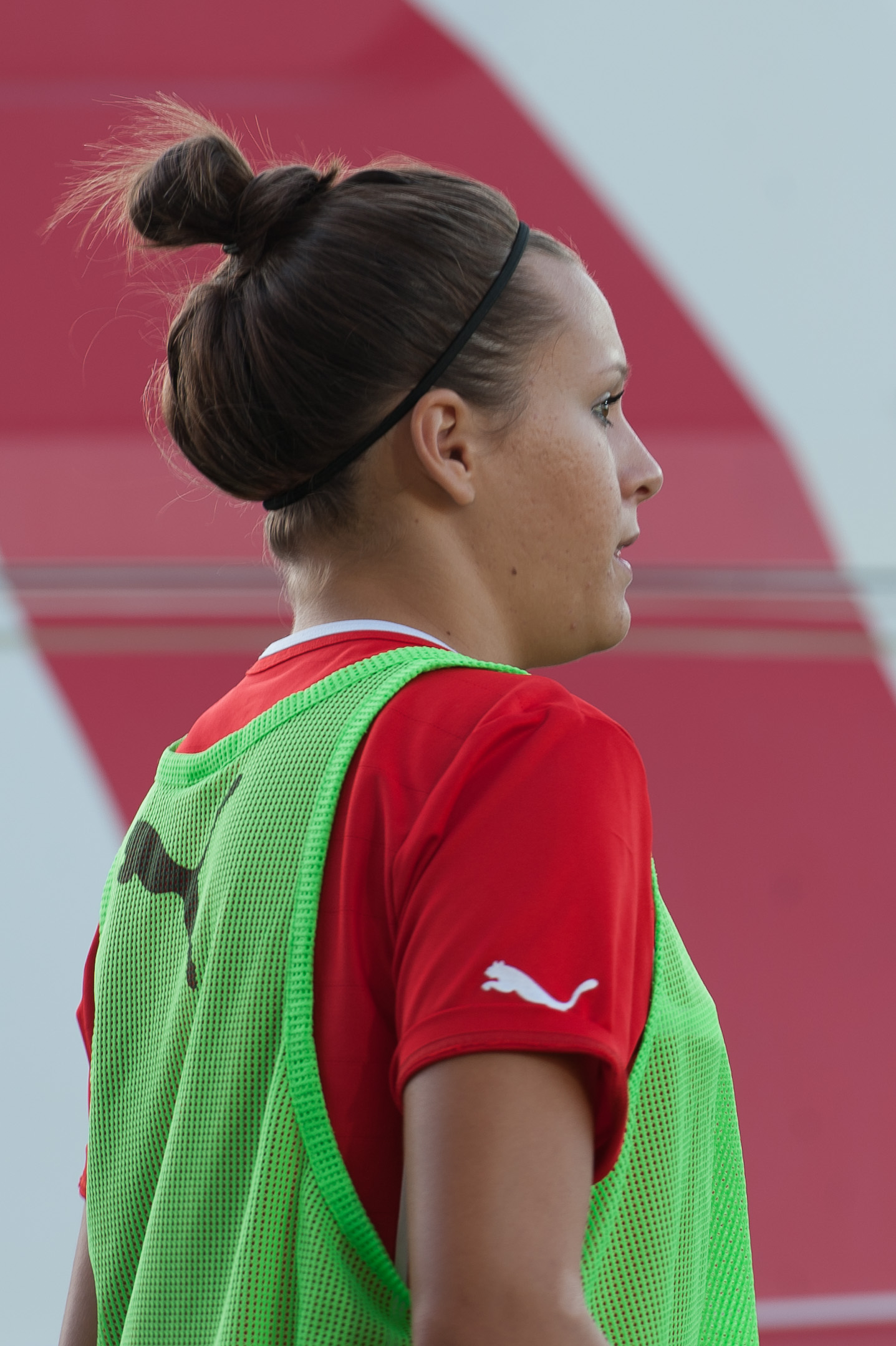 Fußball FIFA Women's World Cup 2015 Qualifying Round Österreich gegen Kasachstan Pasching, 17. September 2014 Simona Koren